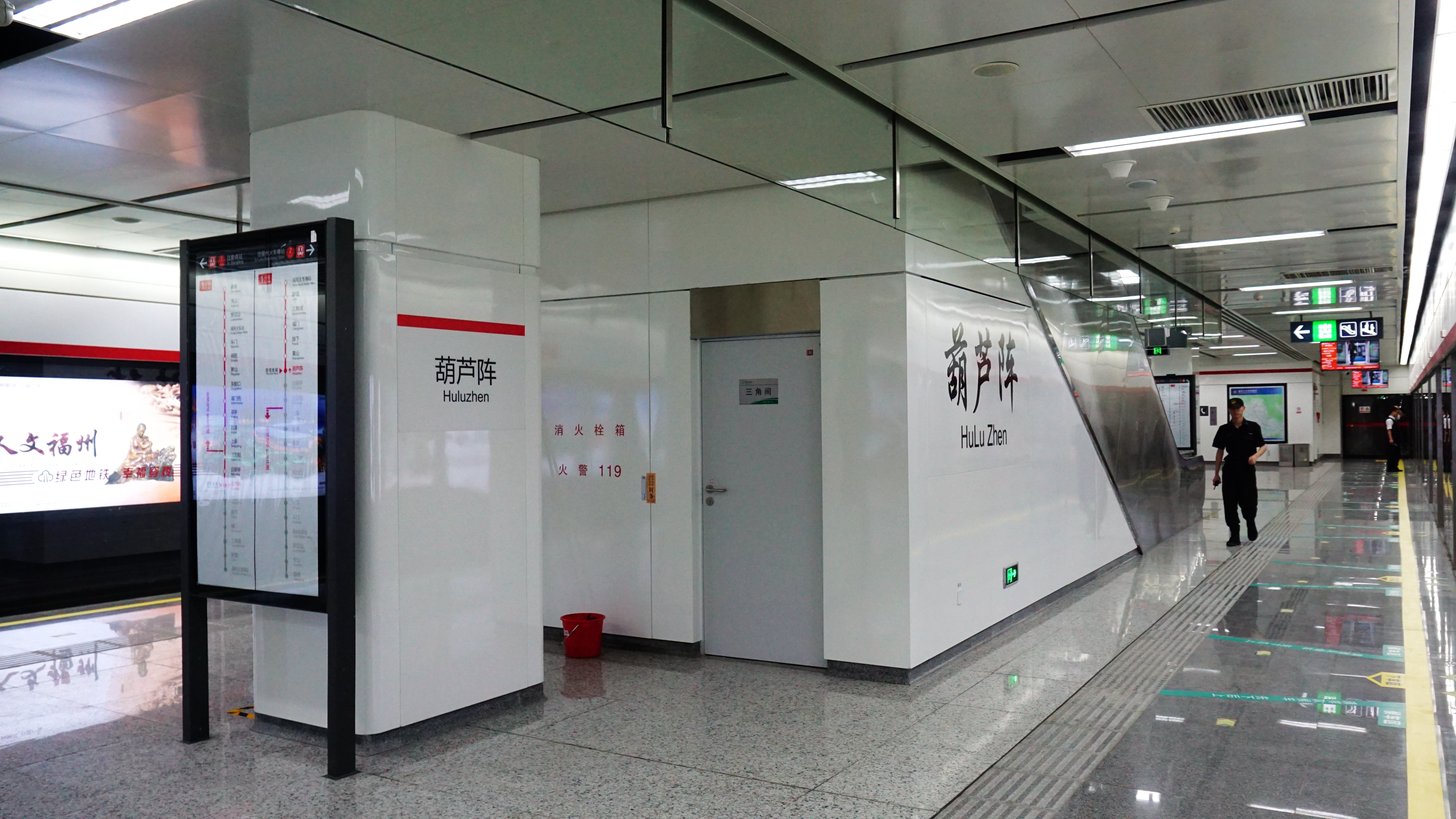 葫芦阵站站台